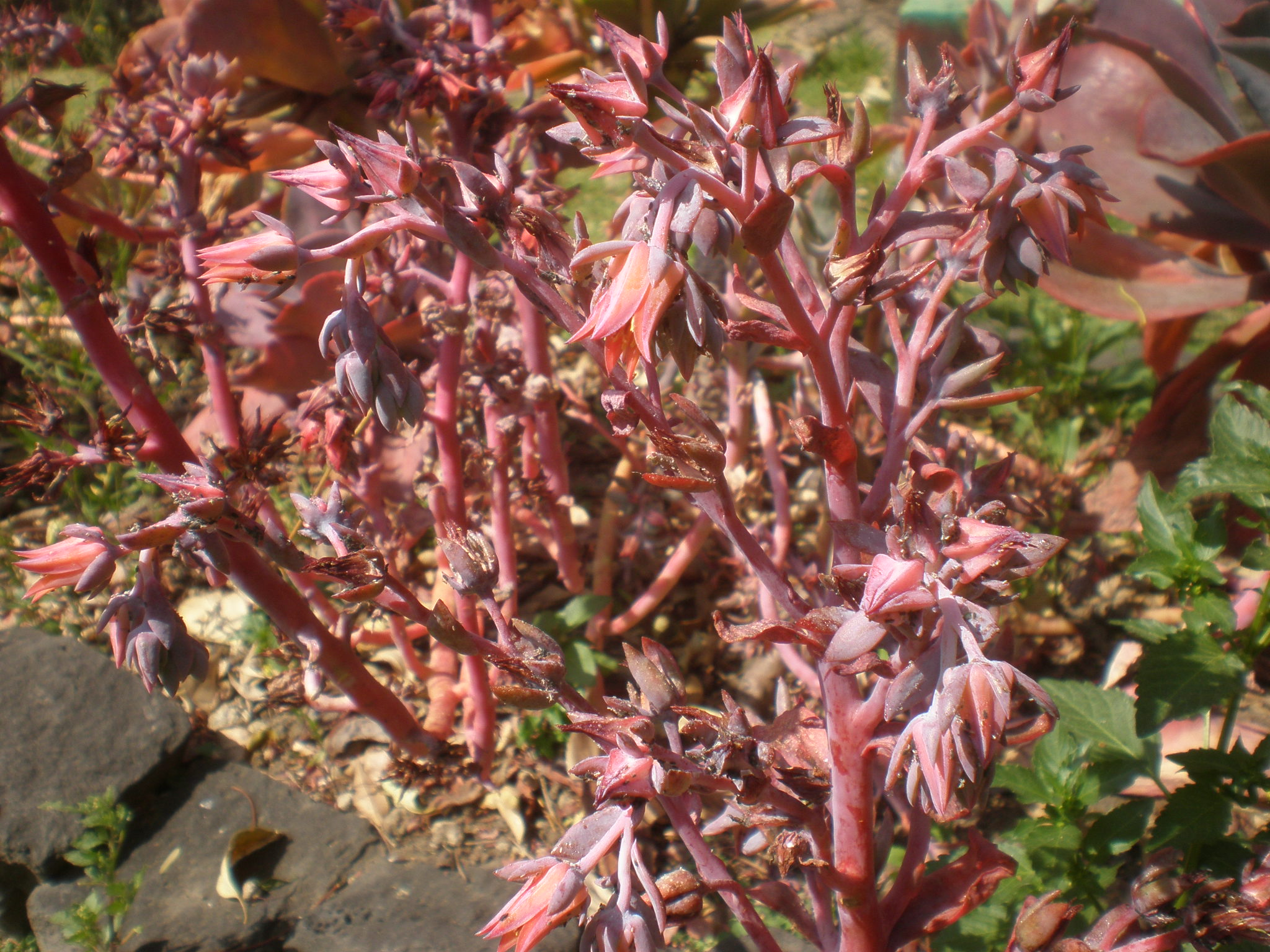 Jardín Botánico de la UNAM, México D.F.